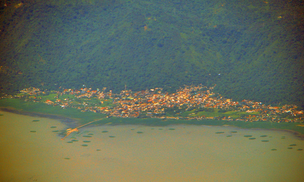 Paeta, Laguna, Philippines